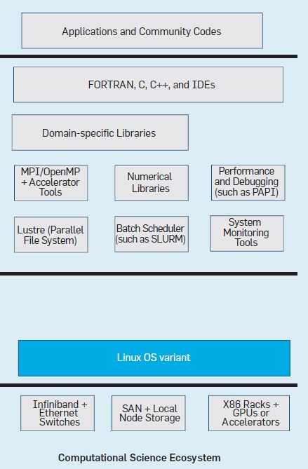 Image de la publication Exascale Computing and Big Data de DANIEL A. REED